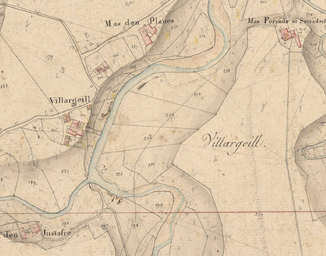 Vilargell, de Sant Joan de Pladecorts, en el Cadastre napoleònic del 1812 (Arxius Departamentals dels Pirineus Orientals)